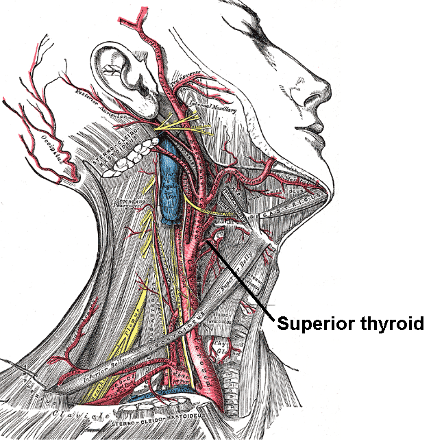 L'artère thyroïdienne supérieure.